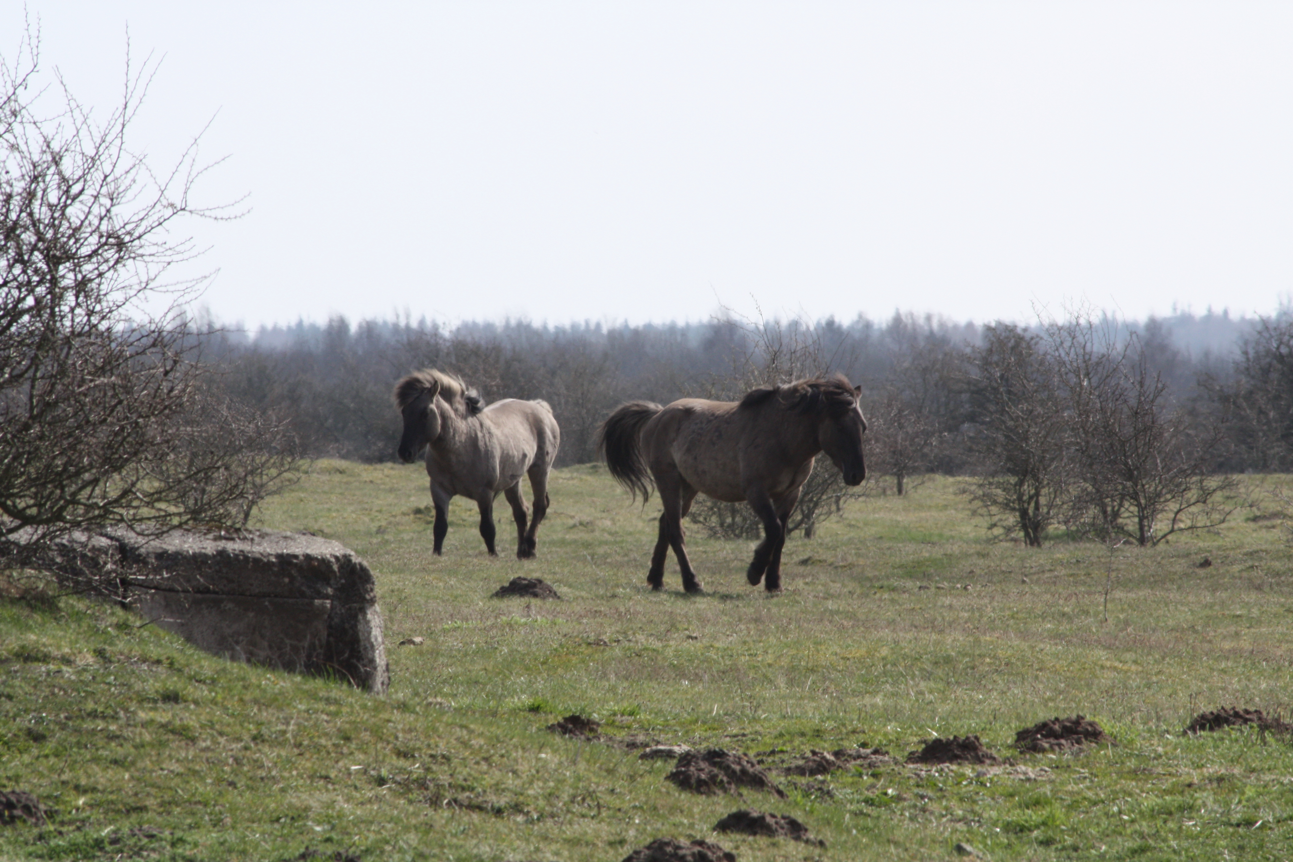 Koniks im Naturerlebnisraum „Stiftungsland Schäferhaus“ in Flensburg, Schleswig-Holstein